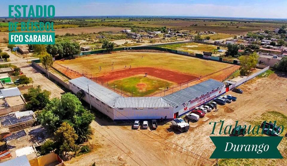 Estadio de beisbol "Francisco Sarabia" Fotografía Pad Prod Producciones